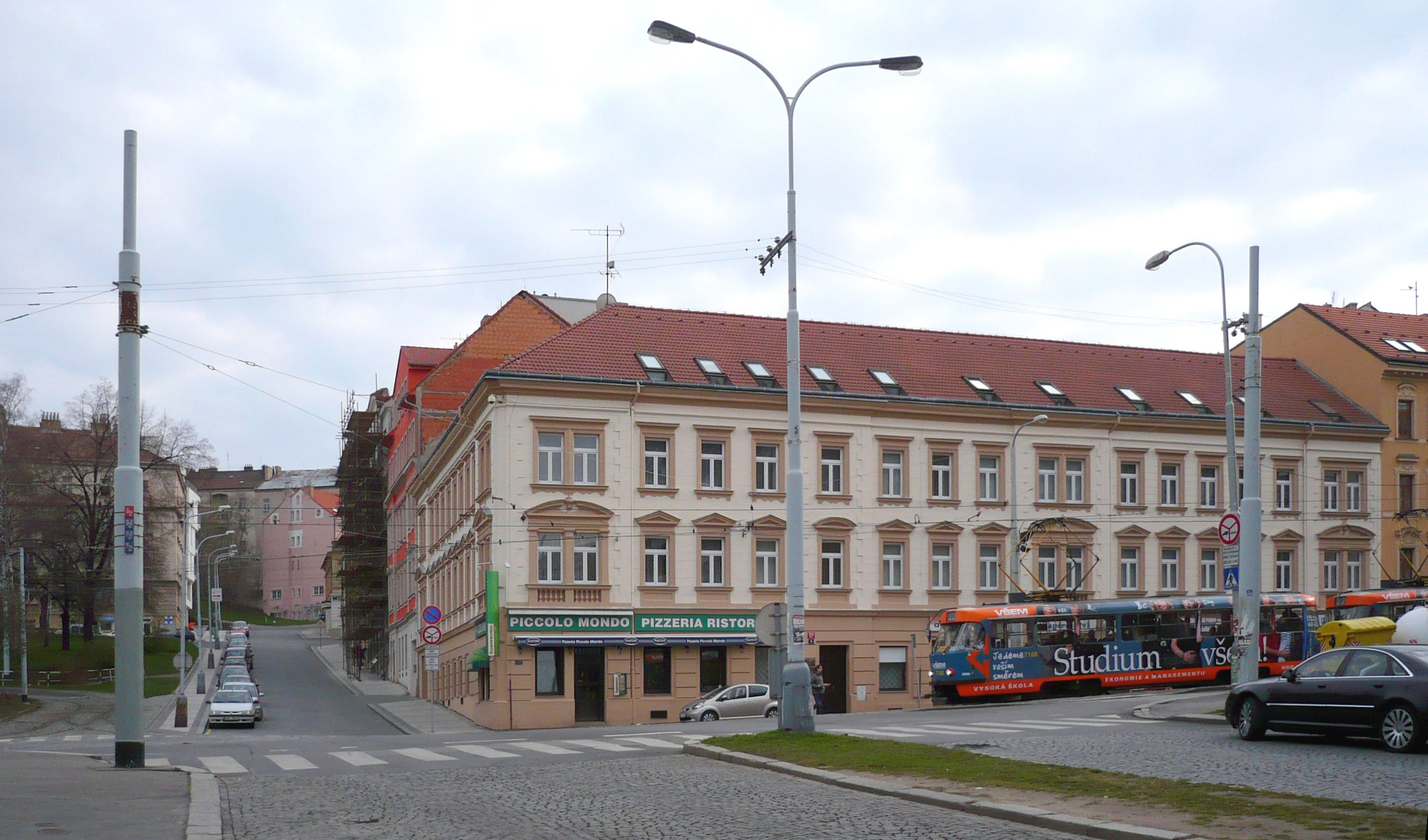 Praha, Břevnov